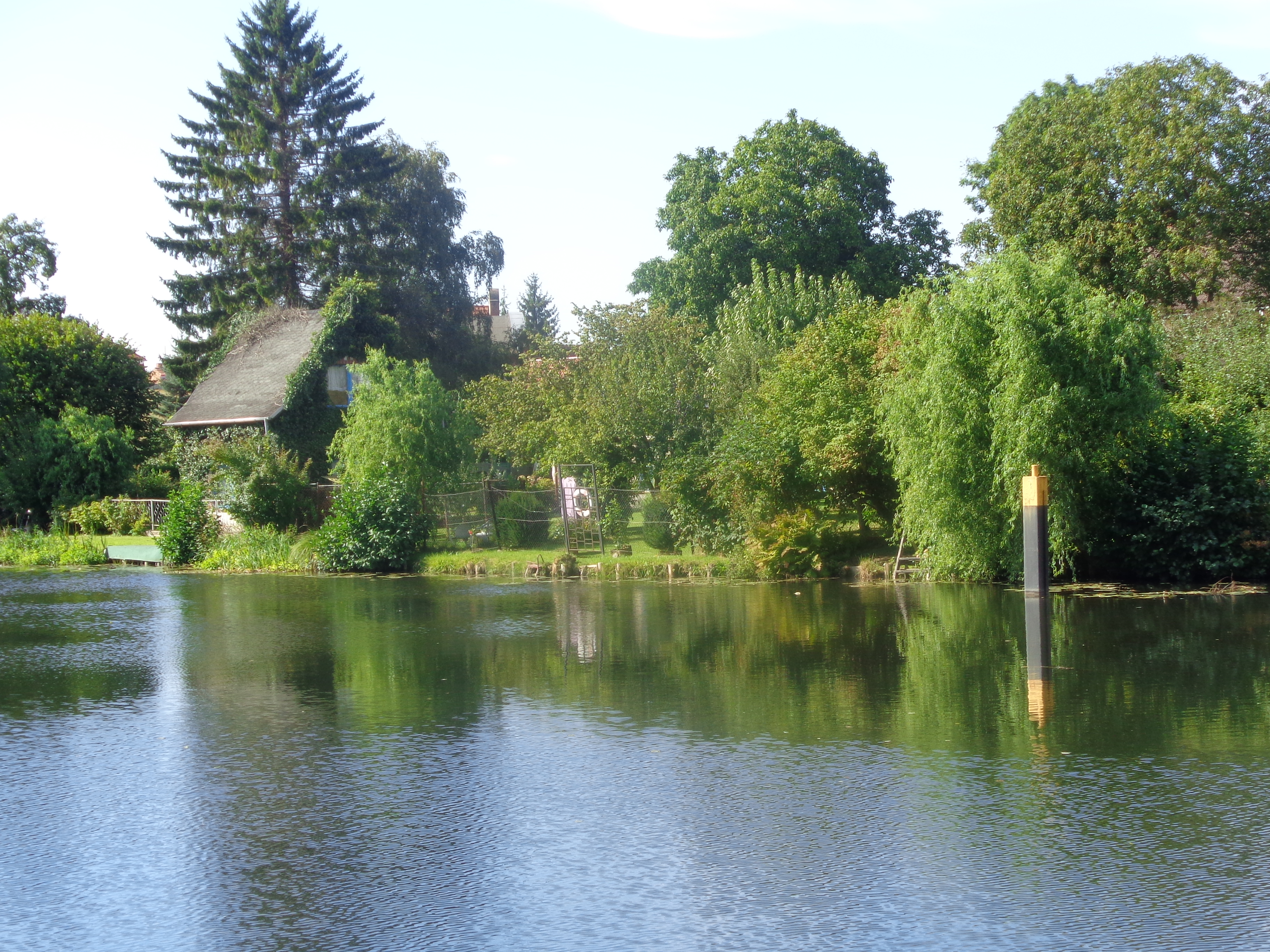 Rechtes Eldeufer in Lübz